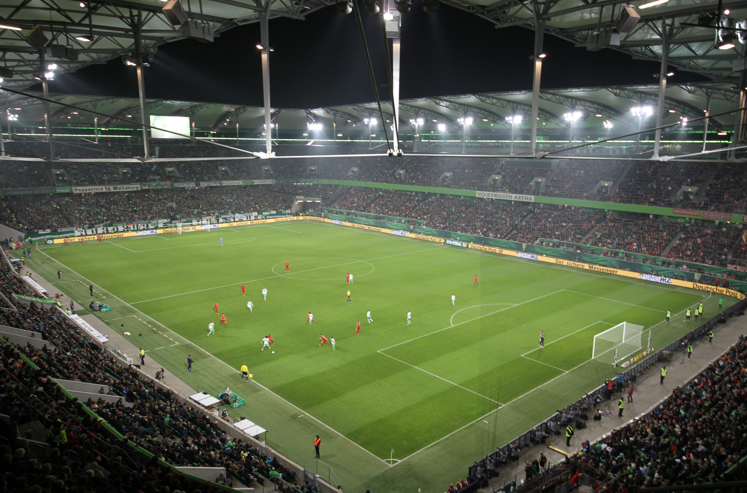 Spielfeld der Volkswagen Arena